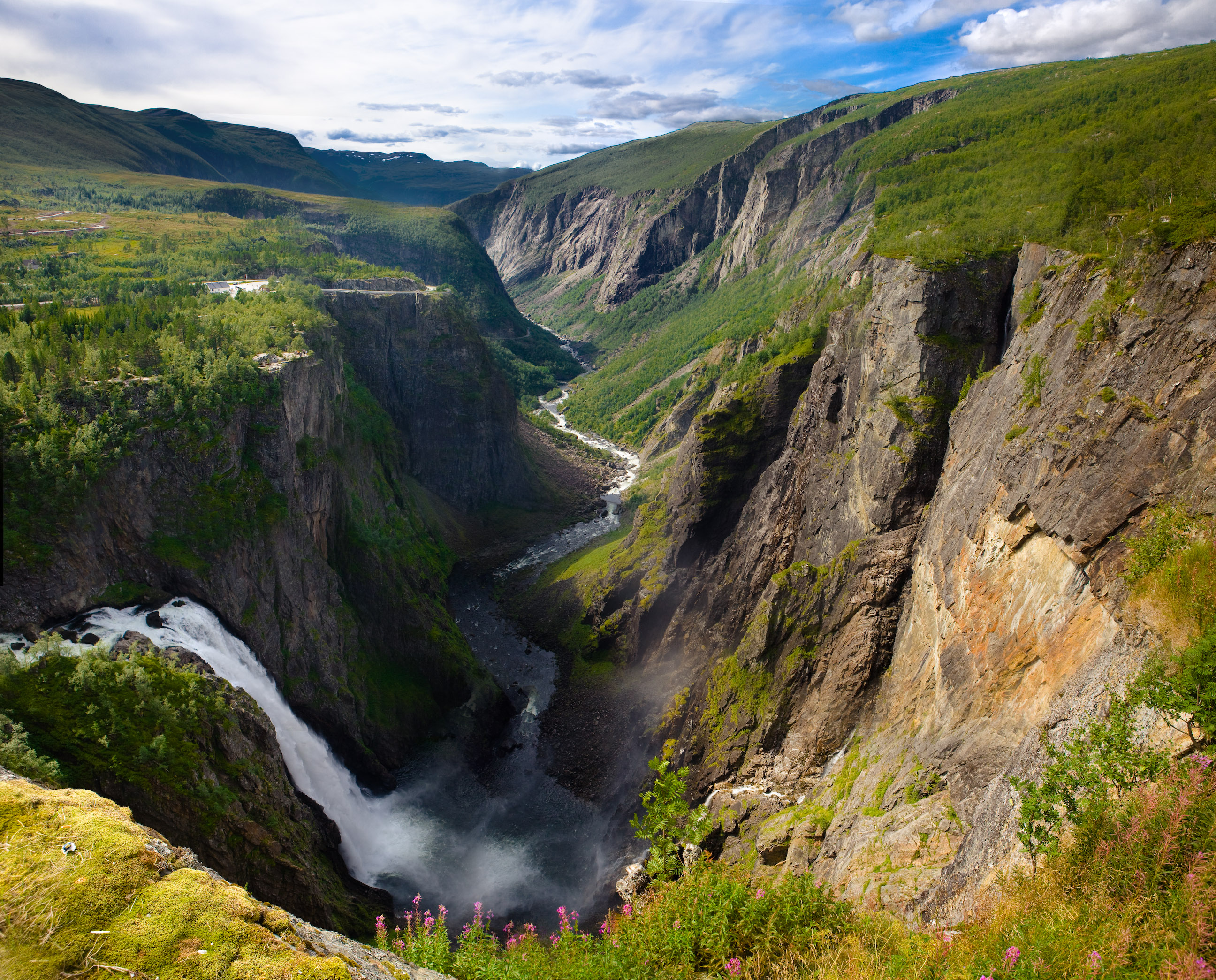 Vøringsfossen in Eidfjord, Hordaland, Norway